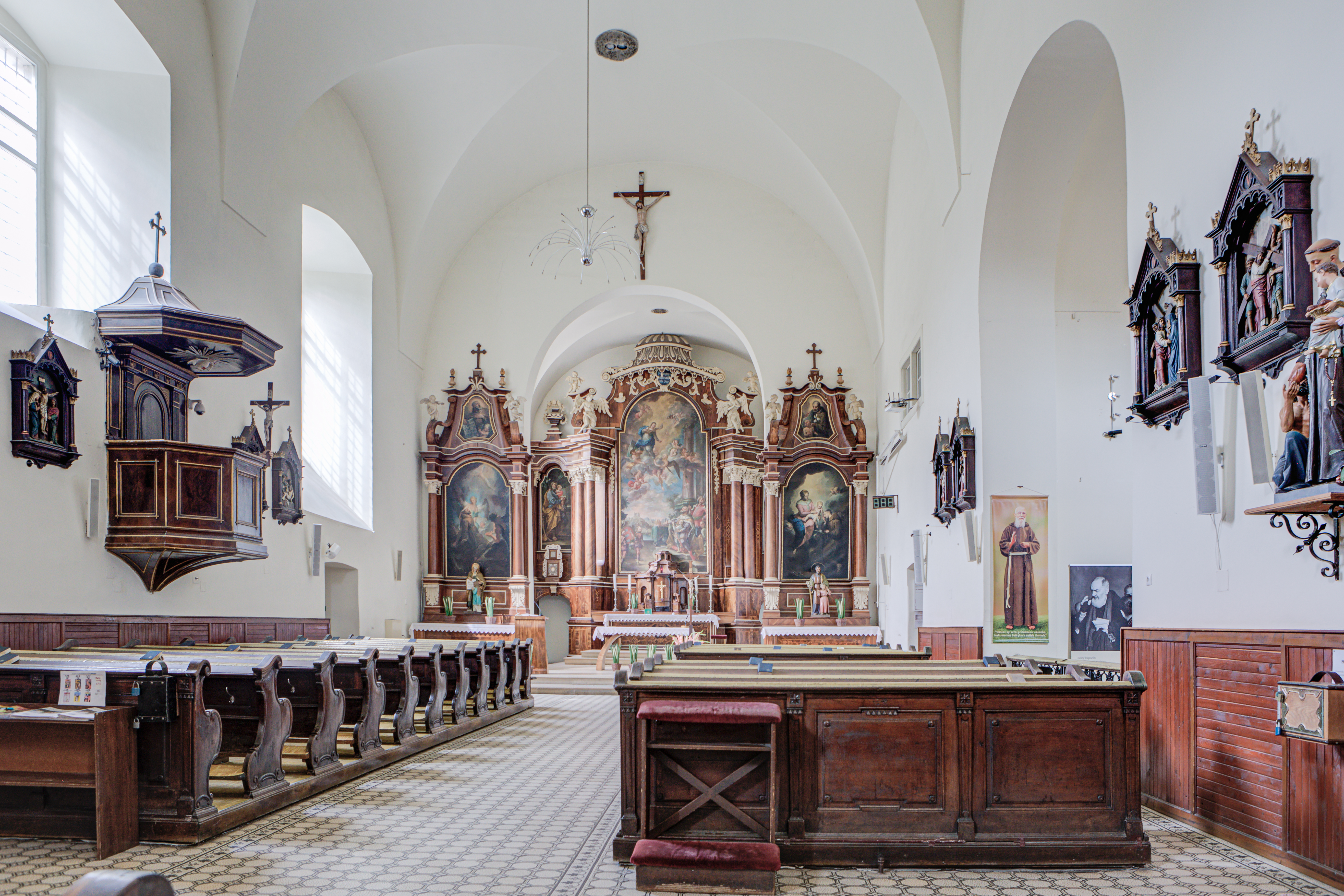 Heliga kung stefans kyrka i Bratislava, interiör